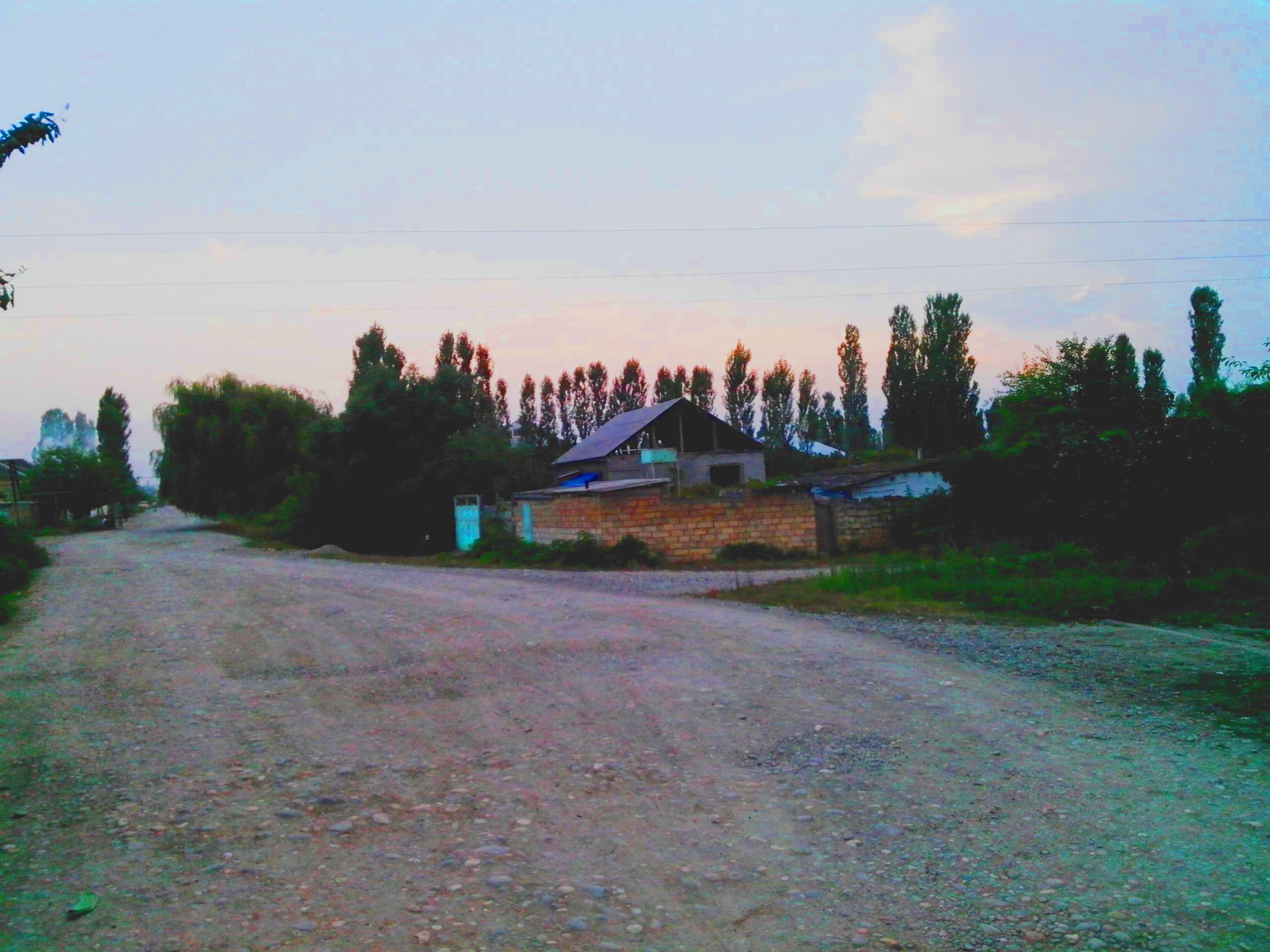 Qobuqıraq